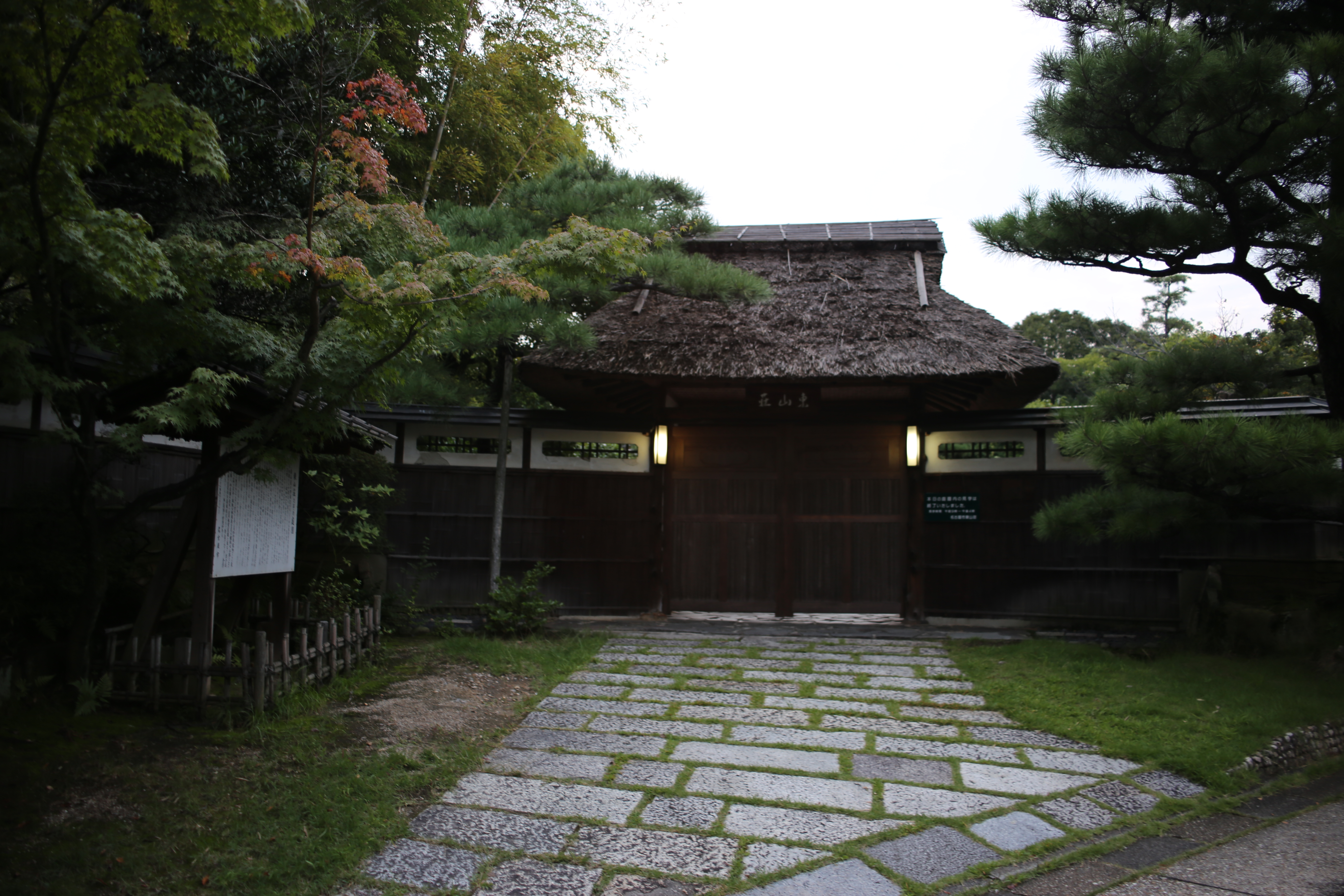 名古屋市瑞穂区初日町の東山荘入口を東側公道南側より撮影